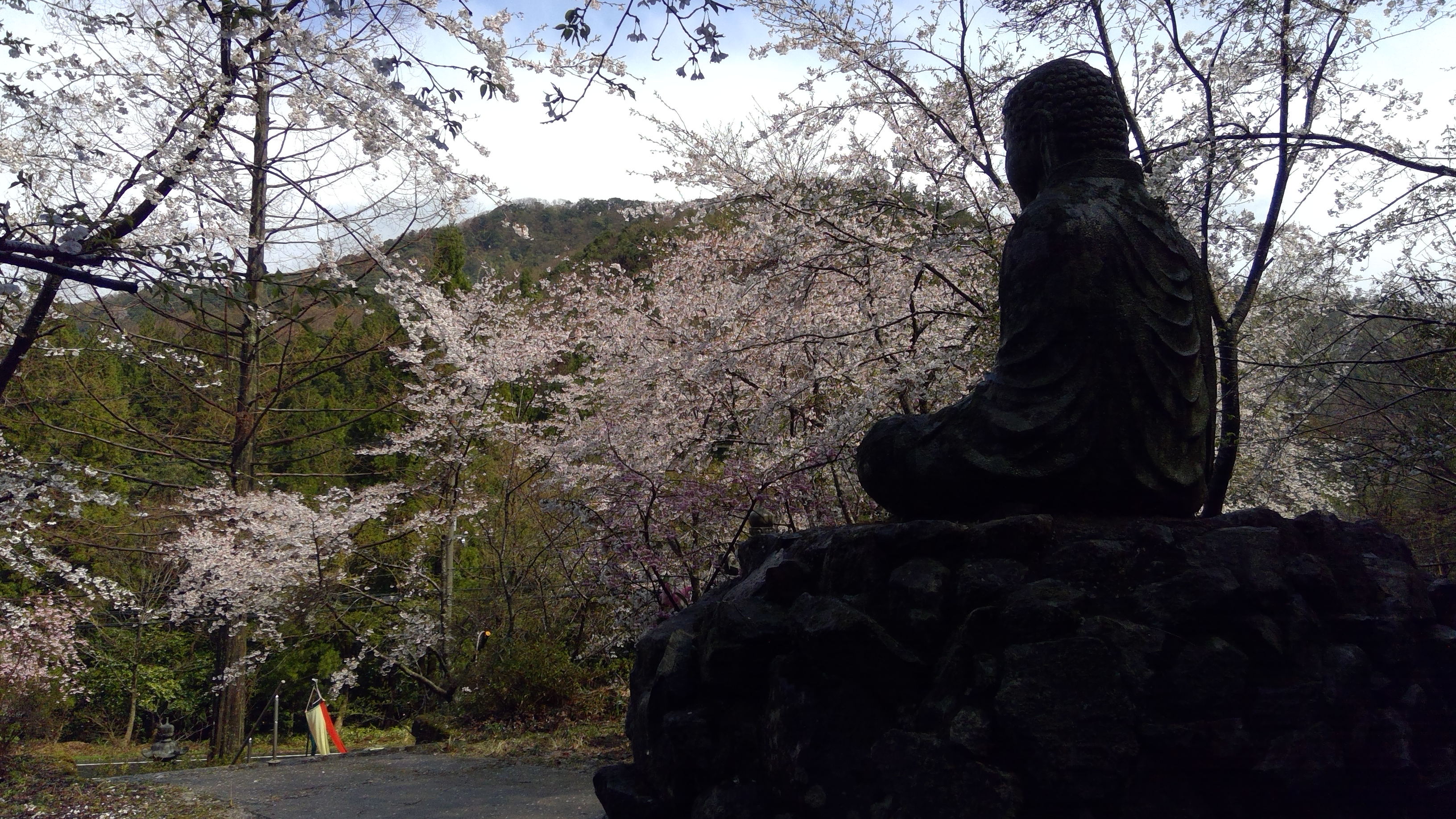 日本遺産「丹後ちりめん回廊」構成文化財のひとつ、丹後大仏の花祭り当日